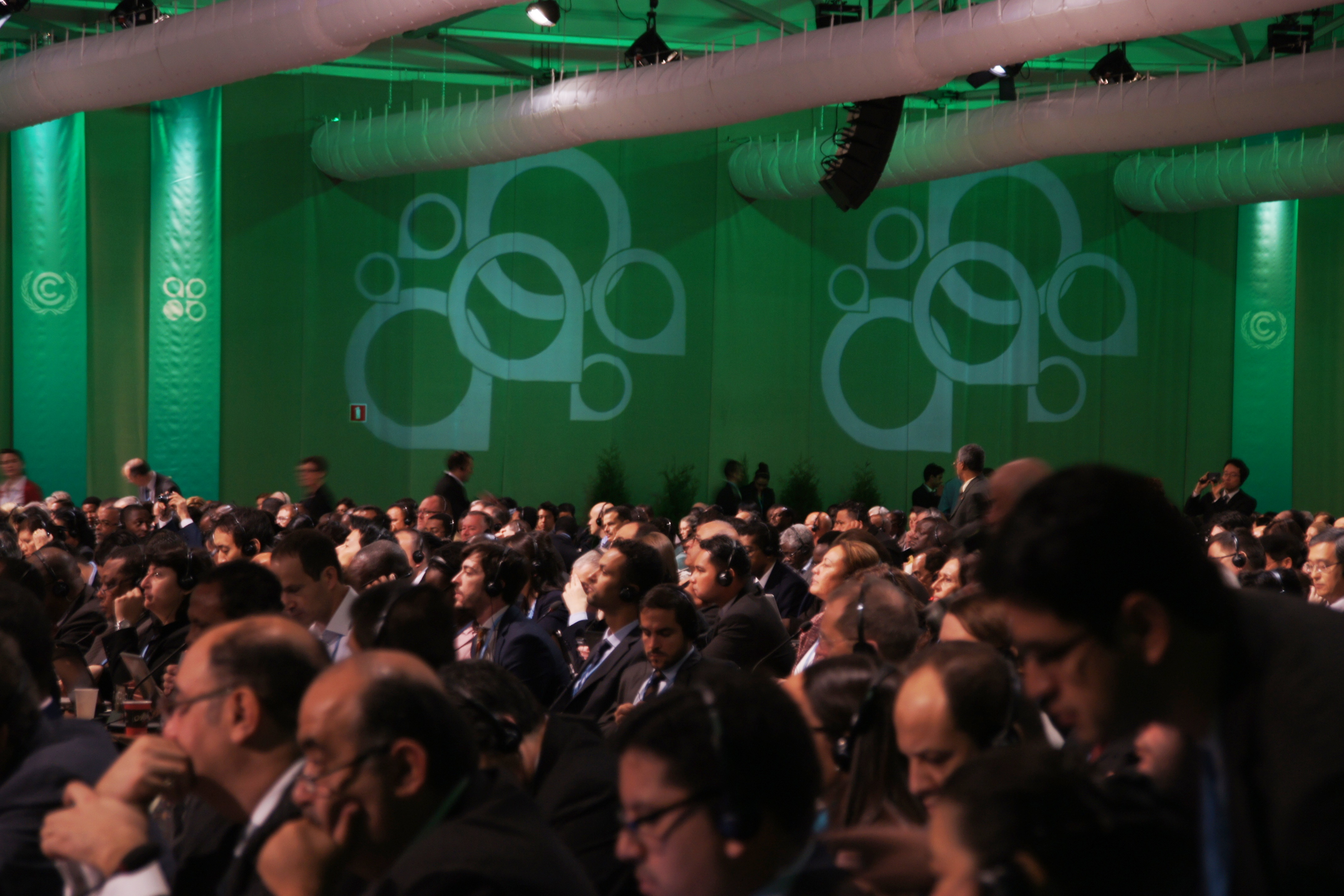 COP19 at National Stadium